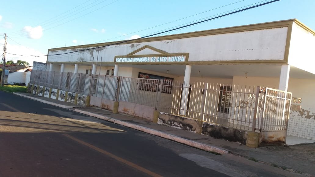 Palácio das Nascentes, sede da Prefeitura Municipal de Alto Longá.